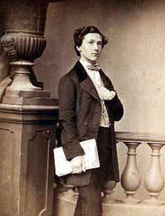 Nicolas Camille Flammarion (1842-1925) im Jahr 1858